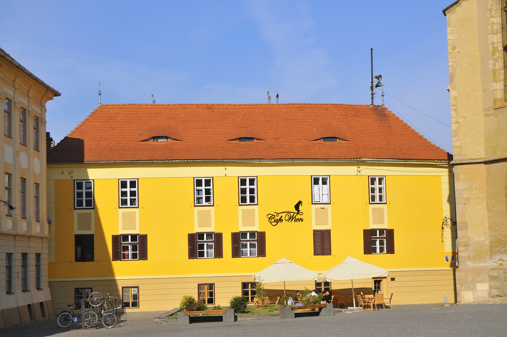 Consistoriul districtual al bisericii evanghelice C.A.